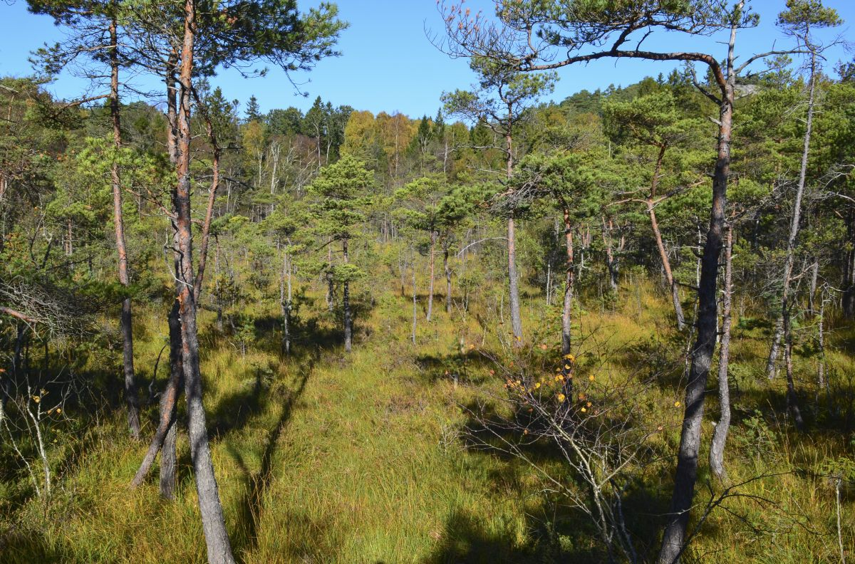 Det er sjelden med intakte myrer så nær kysten i Vestfold. Bare 300 meter fra sjøen ligger Askvikmyra.